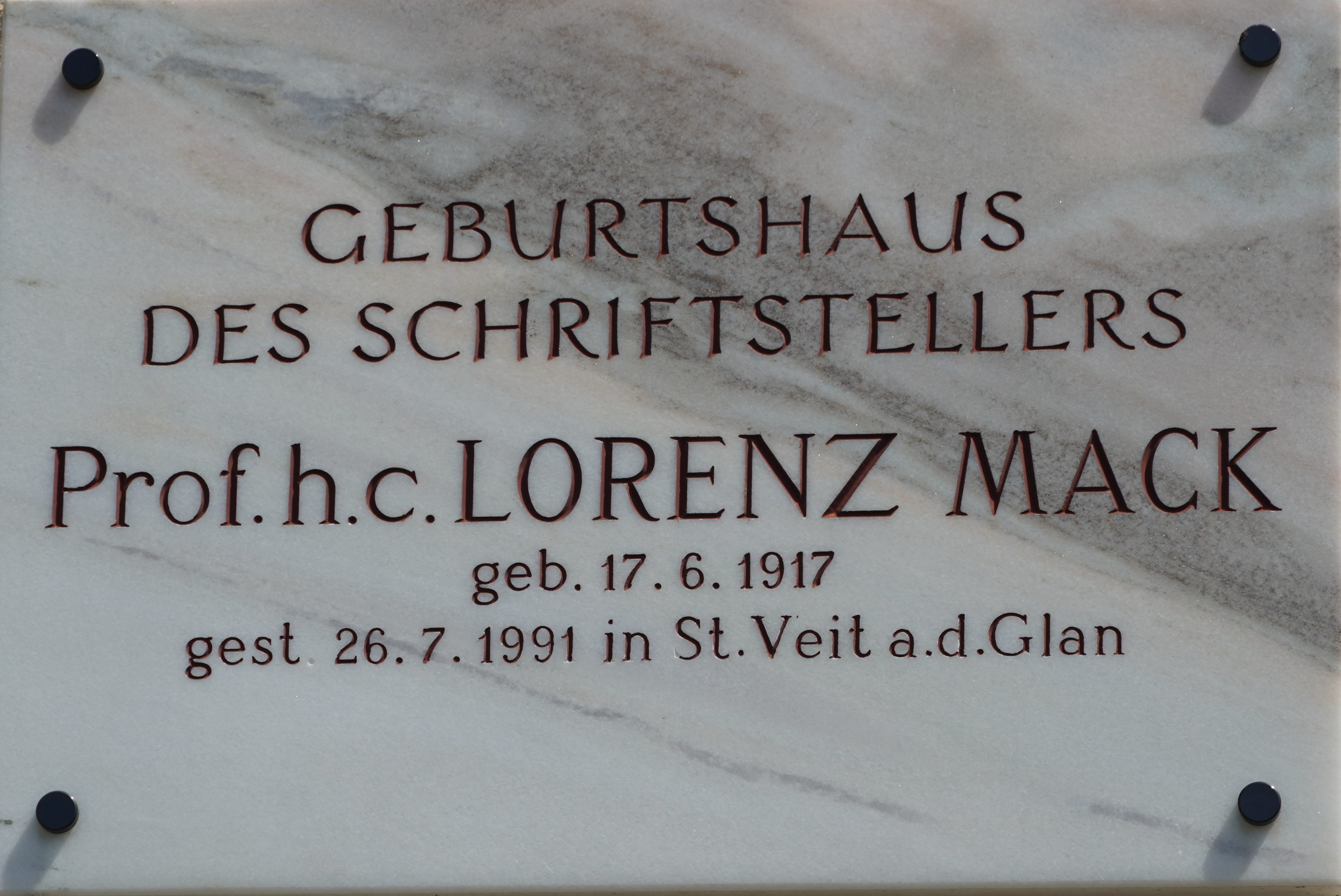 Geburtshaus Prof.h.c. Lorenz Mack in Ferlach, Kirchgasse 14, Bezirk Klagenfurt Land, Kärnten, Österreich, EU